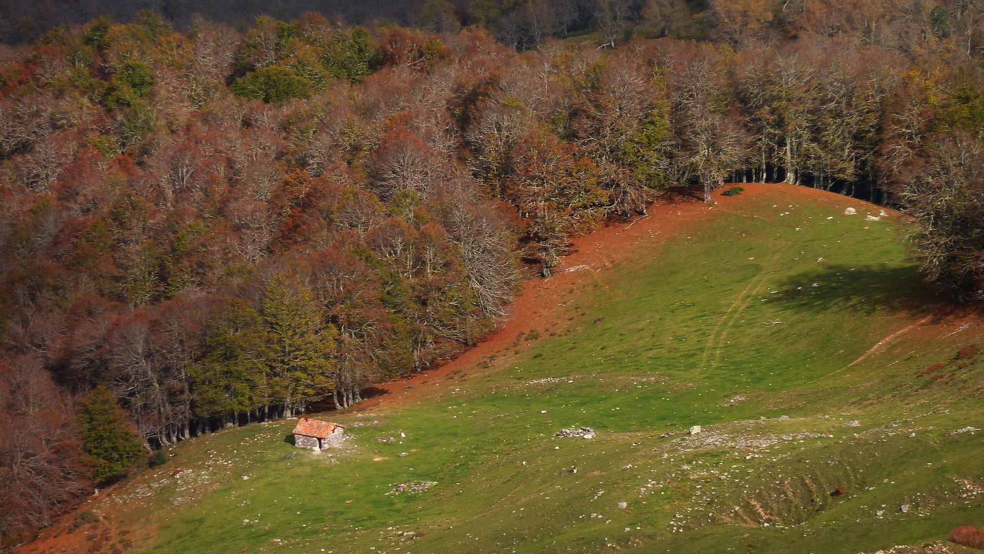 Picos de Europa This is a photography of a Site of Community Importance in Spain with the ID: ES0000003. Natura2000 entry, EEA entry